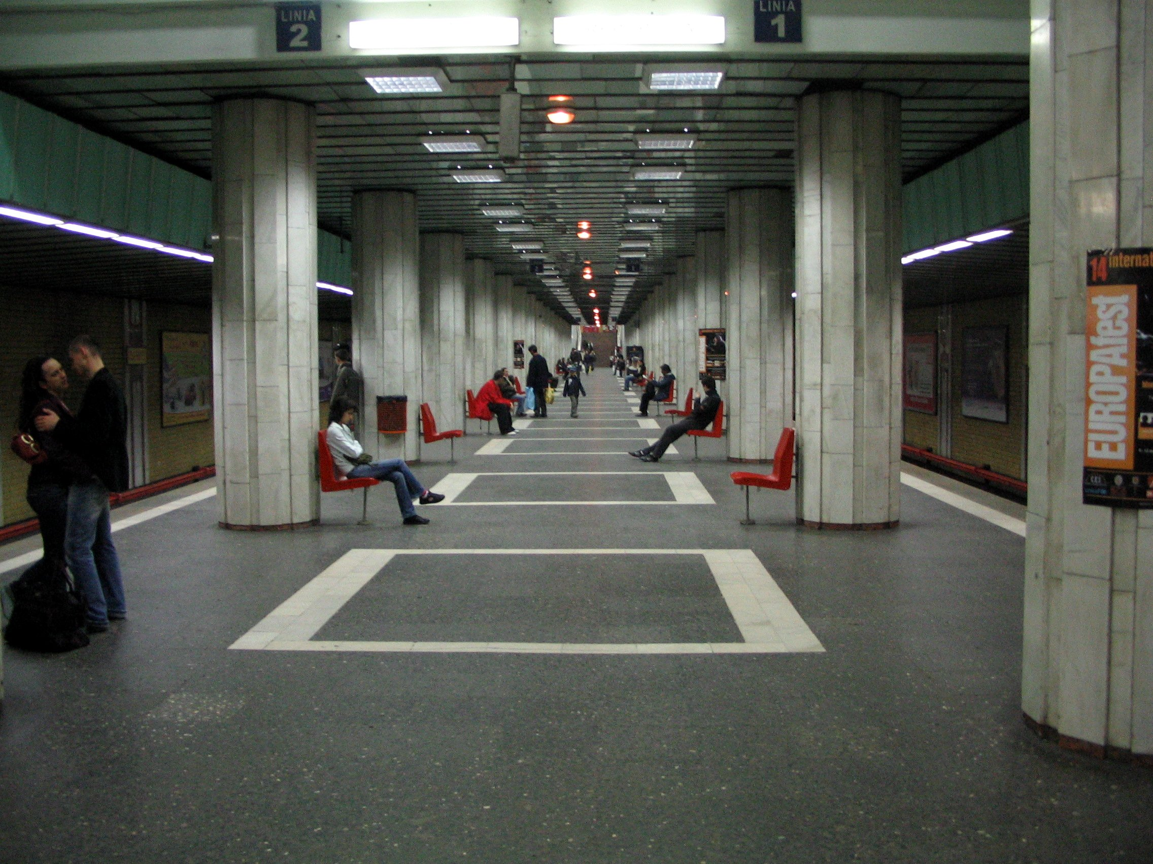 Nicolae Grigorescu Metro station